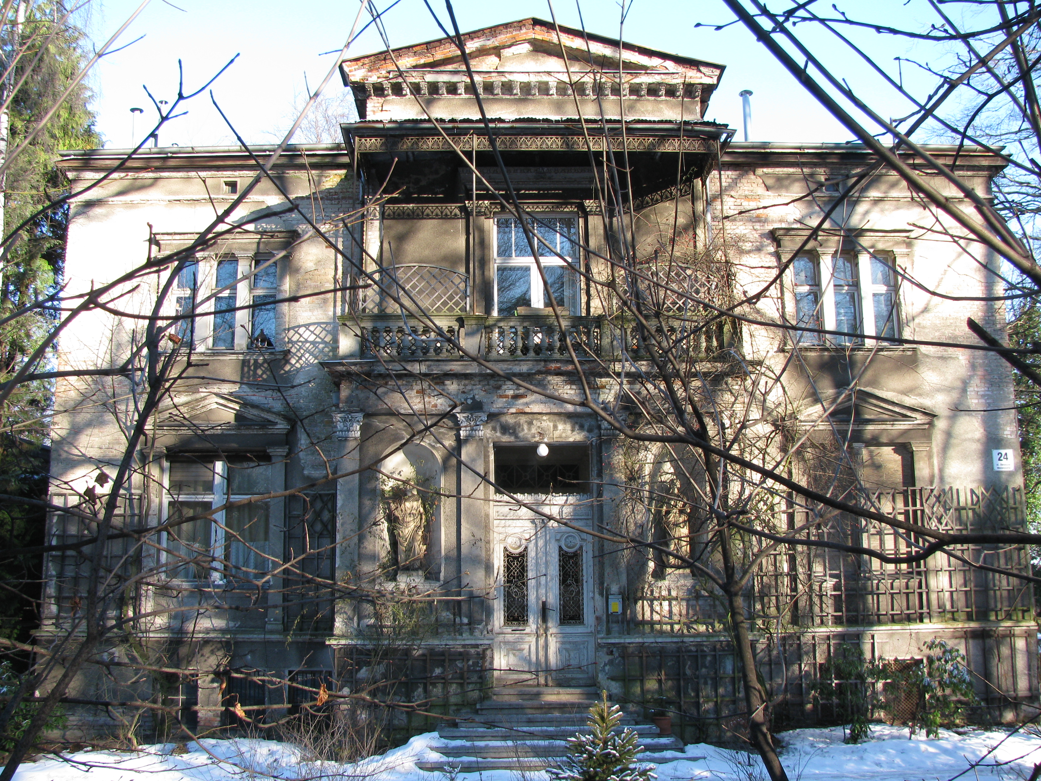 Willa przy ul. Obrońców Westerplatte 24 w Sopocie - zagrała willę Orwicza w filmie "Medium" z 1985. (zabytek nr rejestr. 1010)